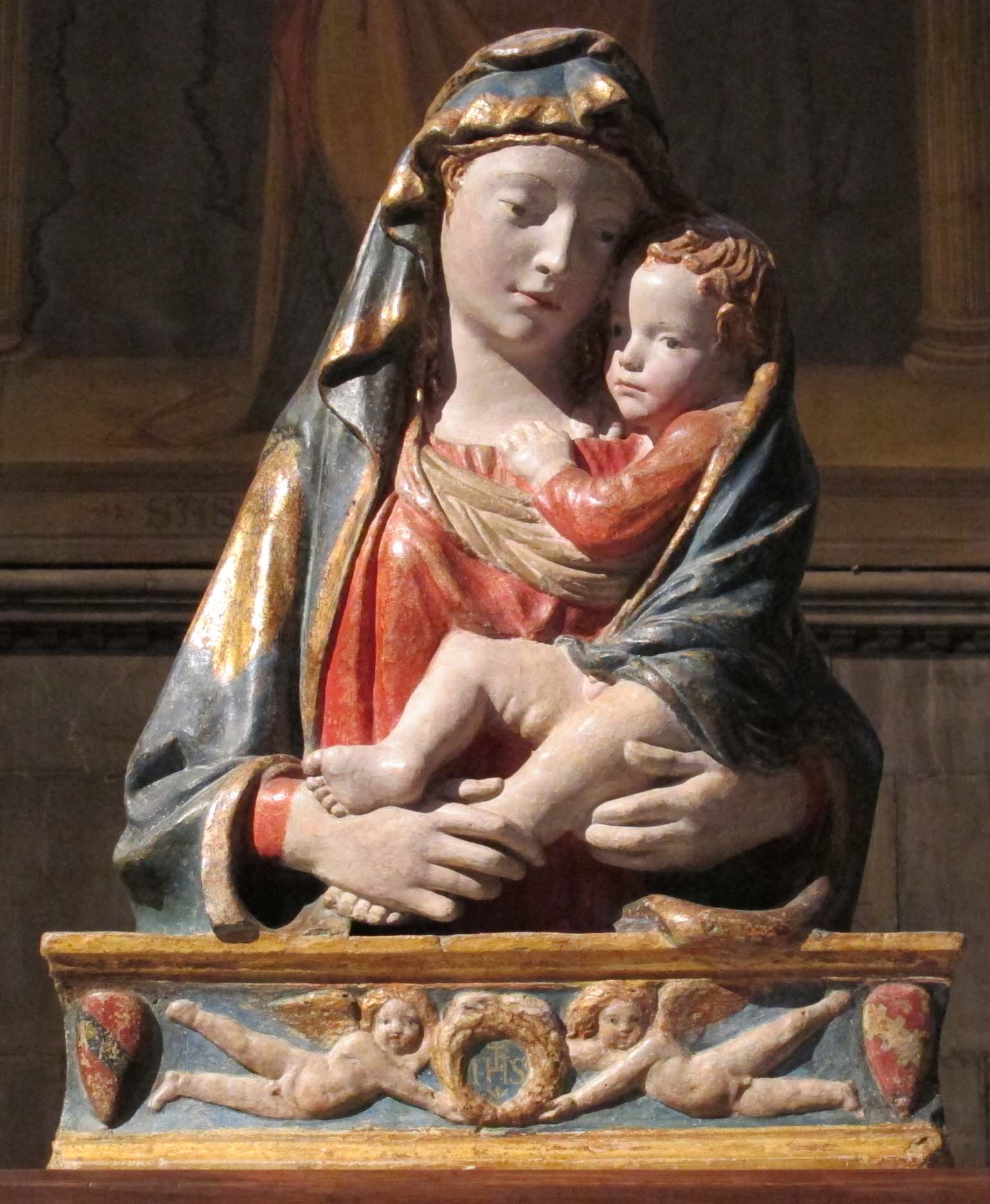 Santa maria del fiore, tribuna di san zanobi, madonna della bottega di ghiberti o brunelleschi